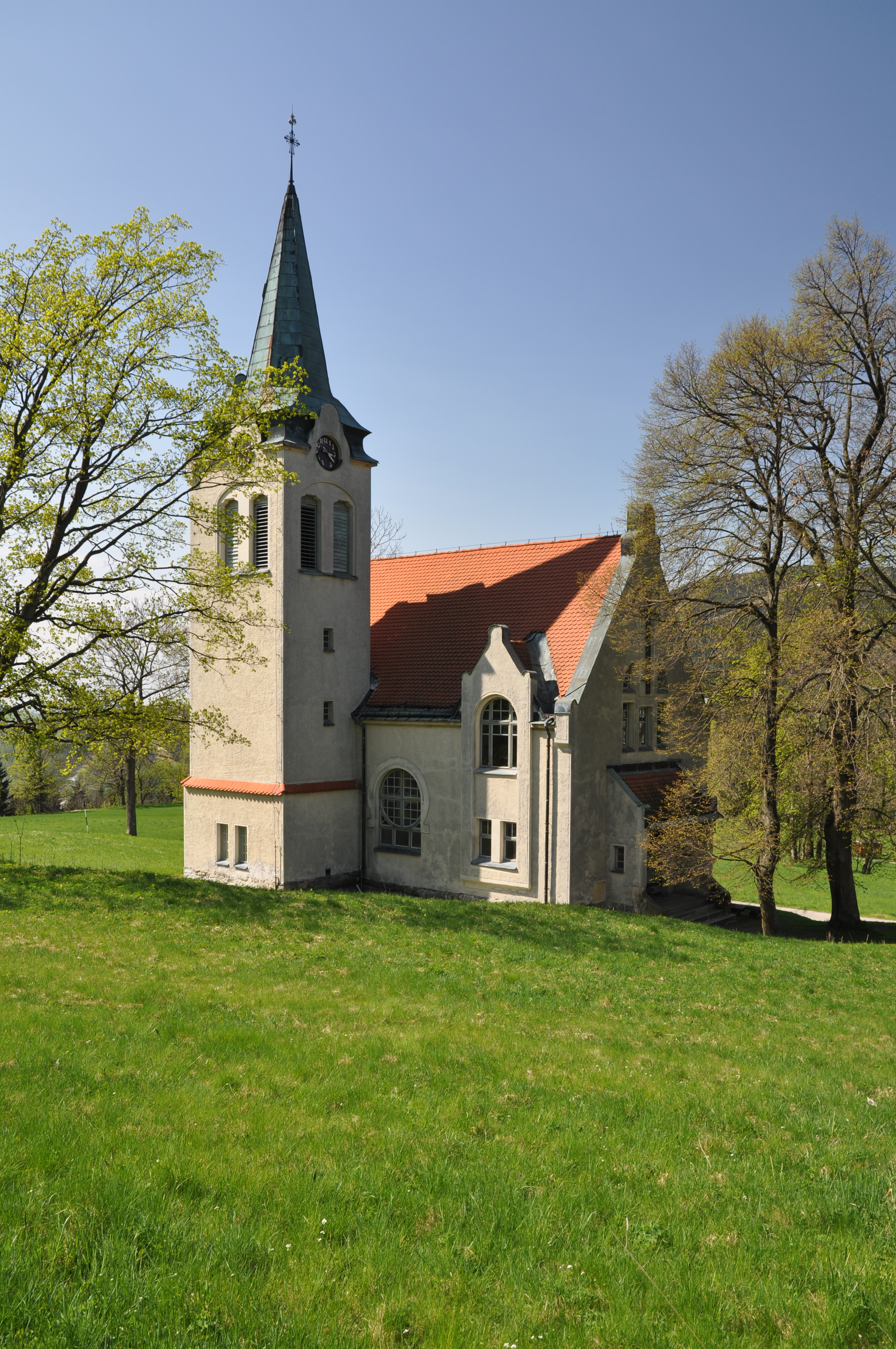 Evangelický kostel v Herlíkovicích - Strážném